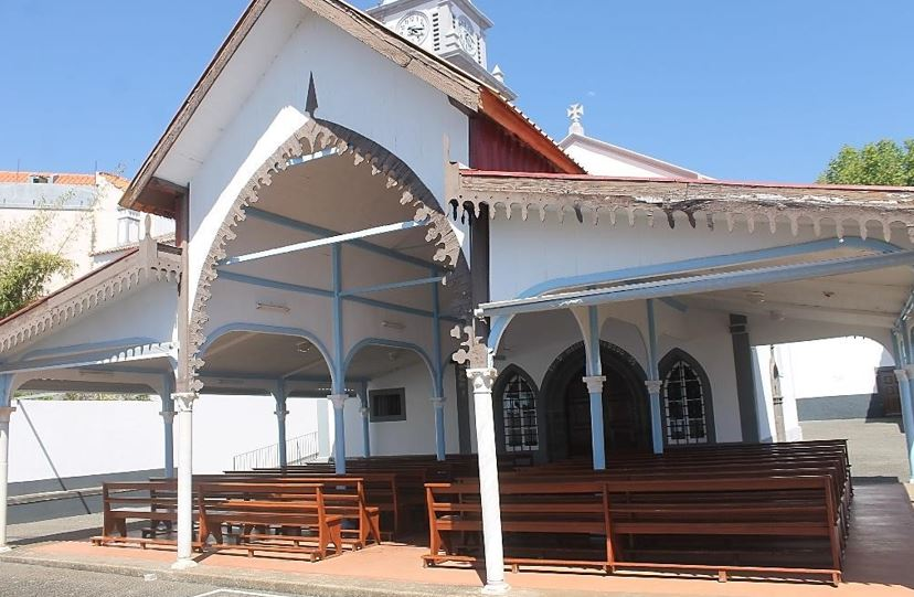 Capela de Nossa Srª do Loreto - Arco da Calheta